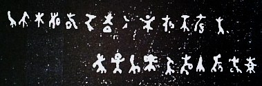 獣皮に記された北海道異体文字